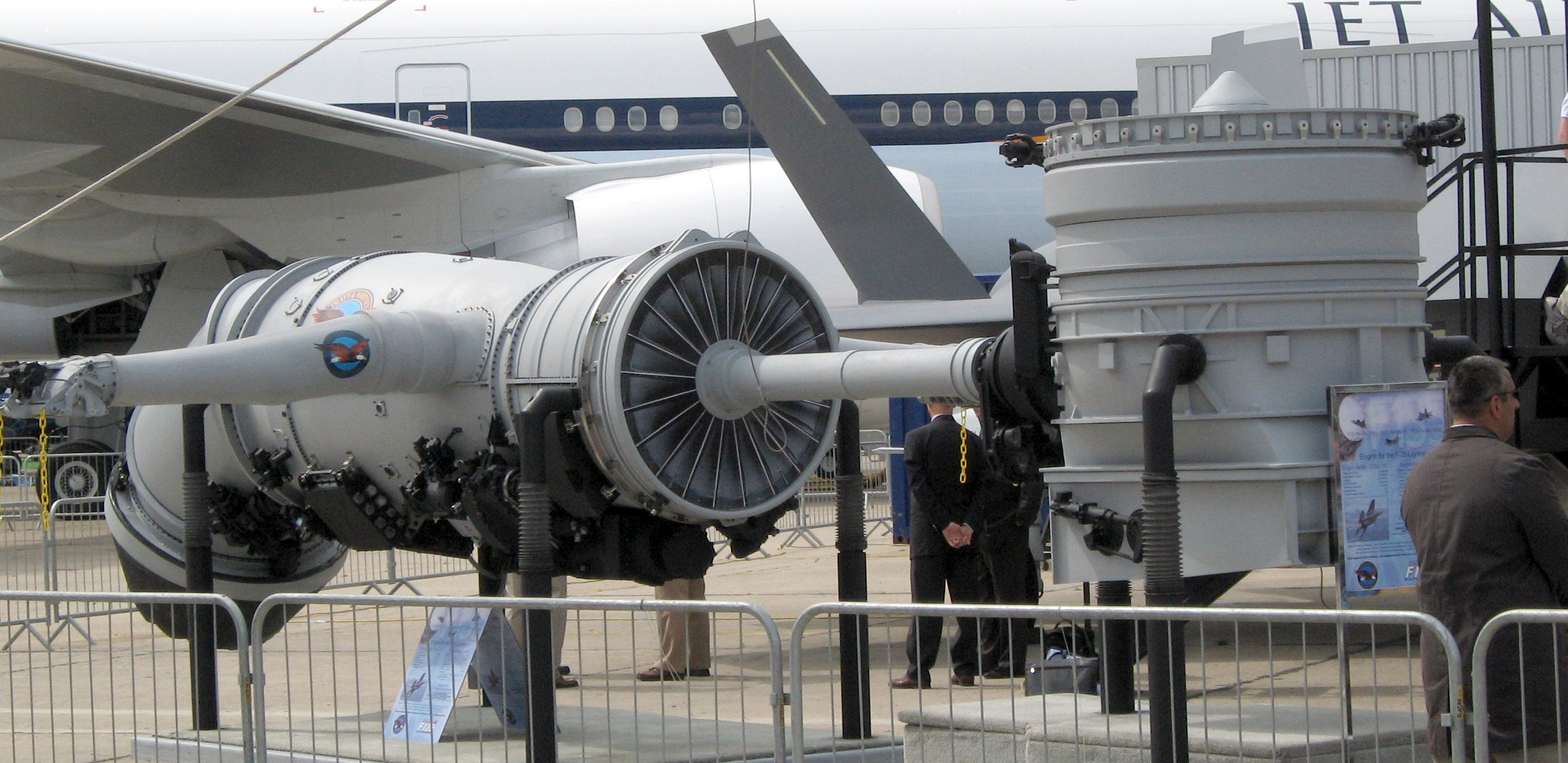 Antrieb der F-35A an der Luftshow in Le Bourget